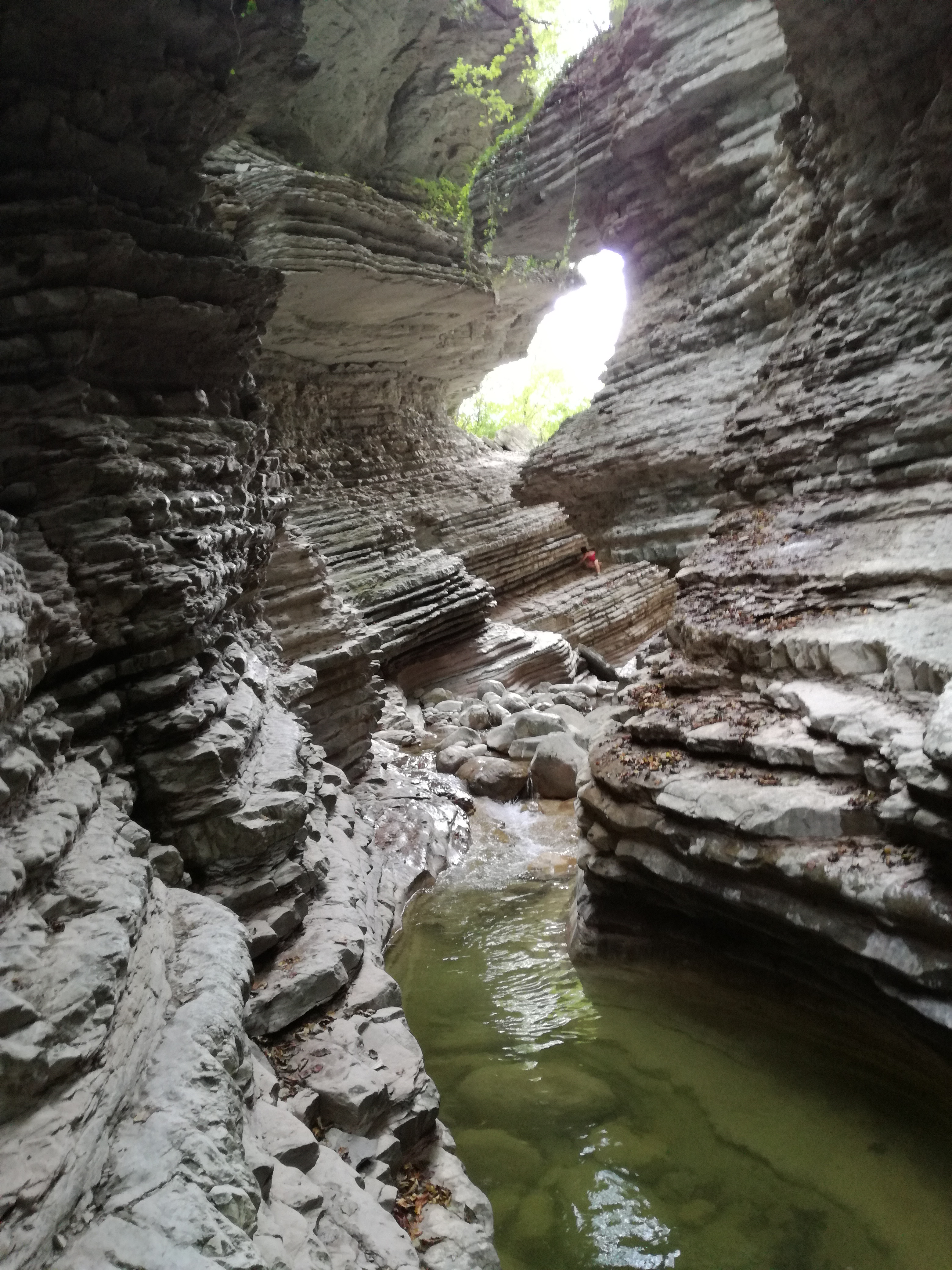 Brent dell'Art,Trichiana